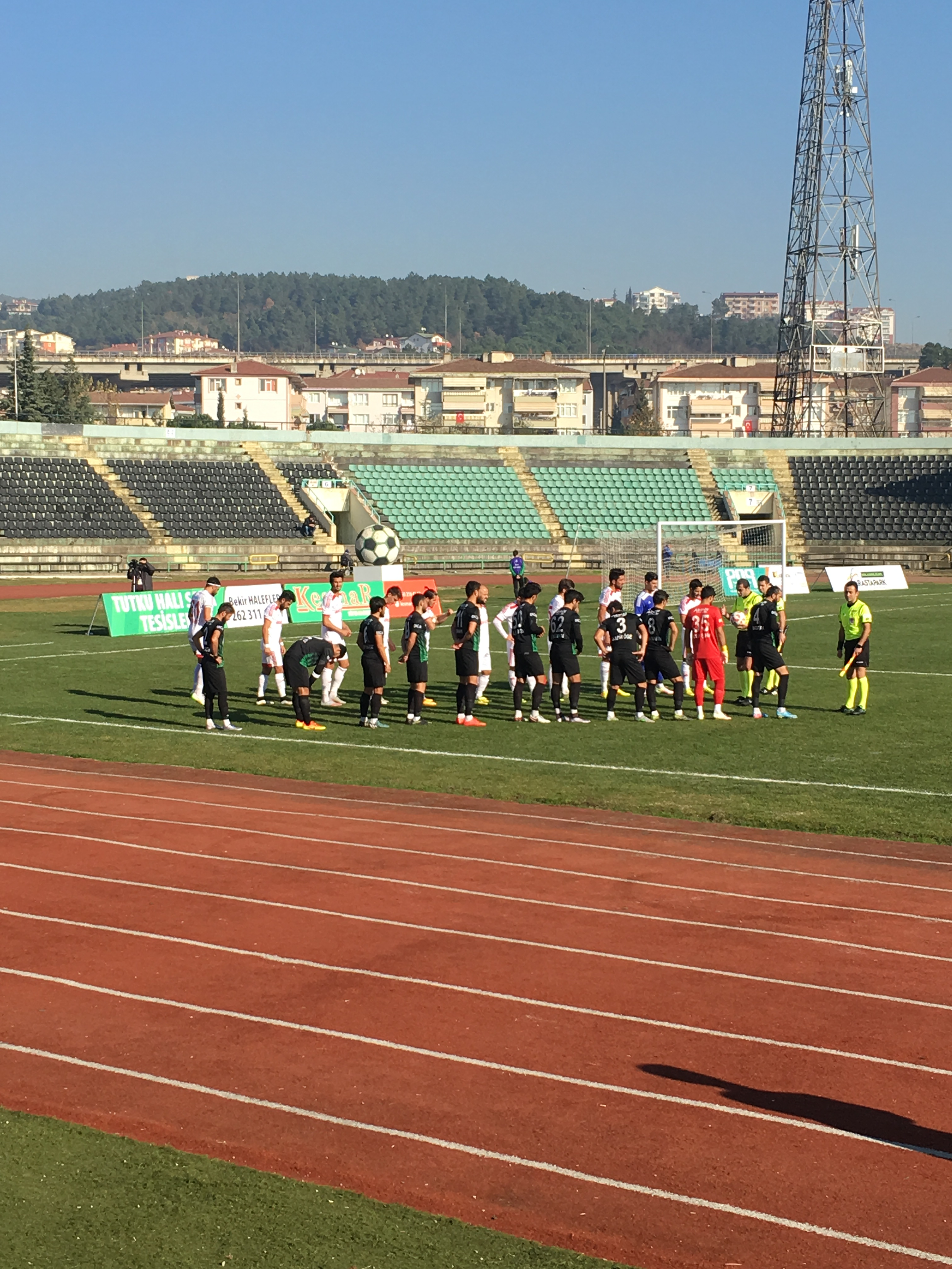 Kocaelispor 35 Yusuf Şenlik, 2 Kadir Gezer, 3 Kadir Öğe, 4 Murat Soner Başak, 8 Sefa Narin, 12 Mesut Özdemir, 50 Ali Keten, 6 Mert Yavuz, 11 Sinan Pektemek, 19 Mehmet Avcı, 62 Şenol Yıldırım 24 Erzincanspor 54 Bilal Atmaca, 15 Volkan Özcan, 20 Cebrail Serçek, 58 Safa Yıldırım, 61 Ömer Serbest, 6 Ahmet Kaan Ergün, 11 Sefer Sever, 14 Erdi Kasapoğlu, 23 Emre Özkurt, 55 Yasin Dülger, 67 Oğuz Küçük Hakemler: R.Alkım Aksoy, Aykut Küçük, Boran Turhan